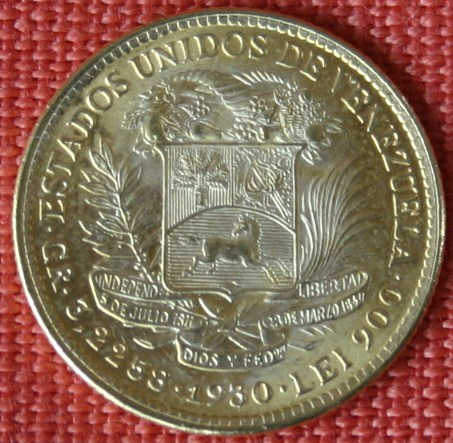 Revers der 10 Bolivares Goldmünze von 1930